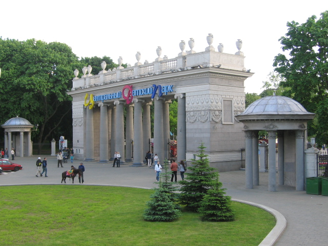 Минск, парк Горького, главный вход